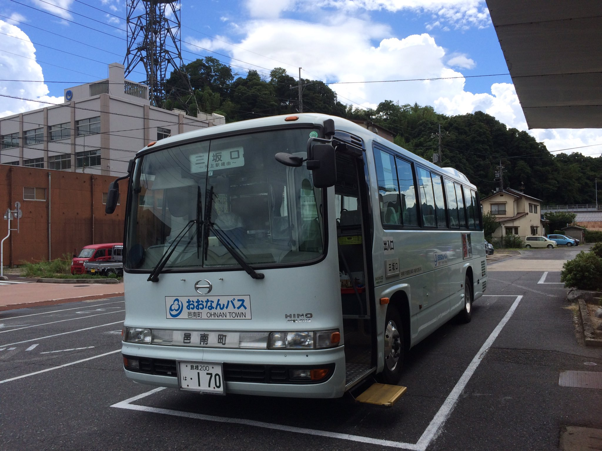 邑南町営バスに使用されるメルファ。石見川本駅前で撮影。